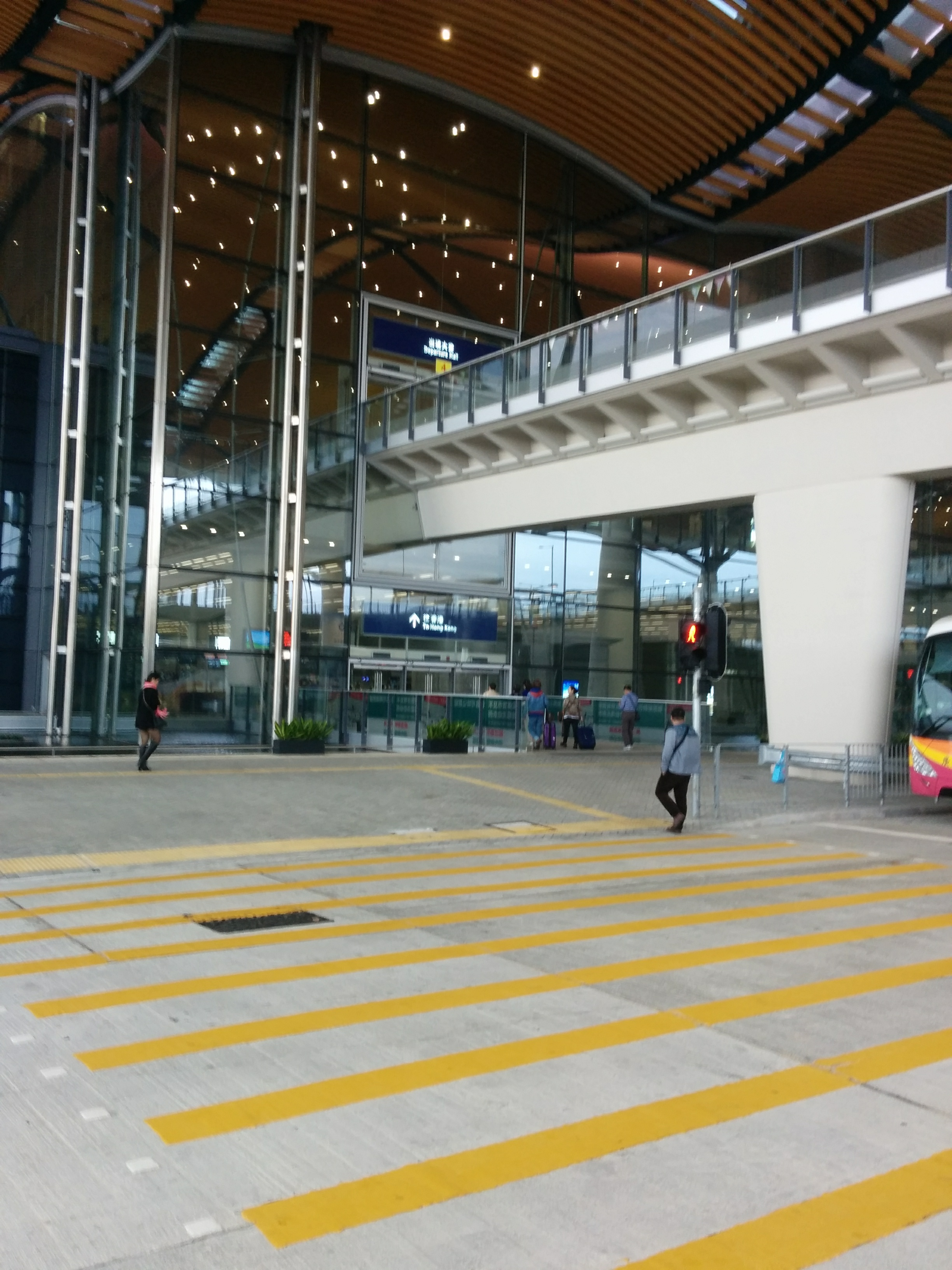 中文（中国大陆）: 港珠澳大桥香港旅检大楼穿梭巴士落客区